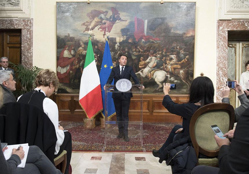 Matteo Renzi alla conferenza stampa post referendum costituzionale 2016